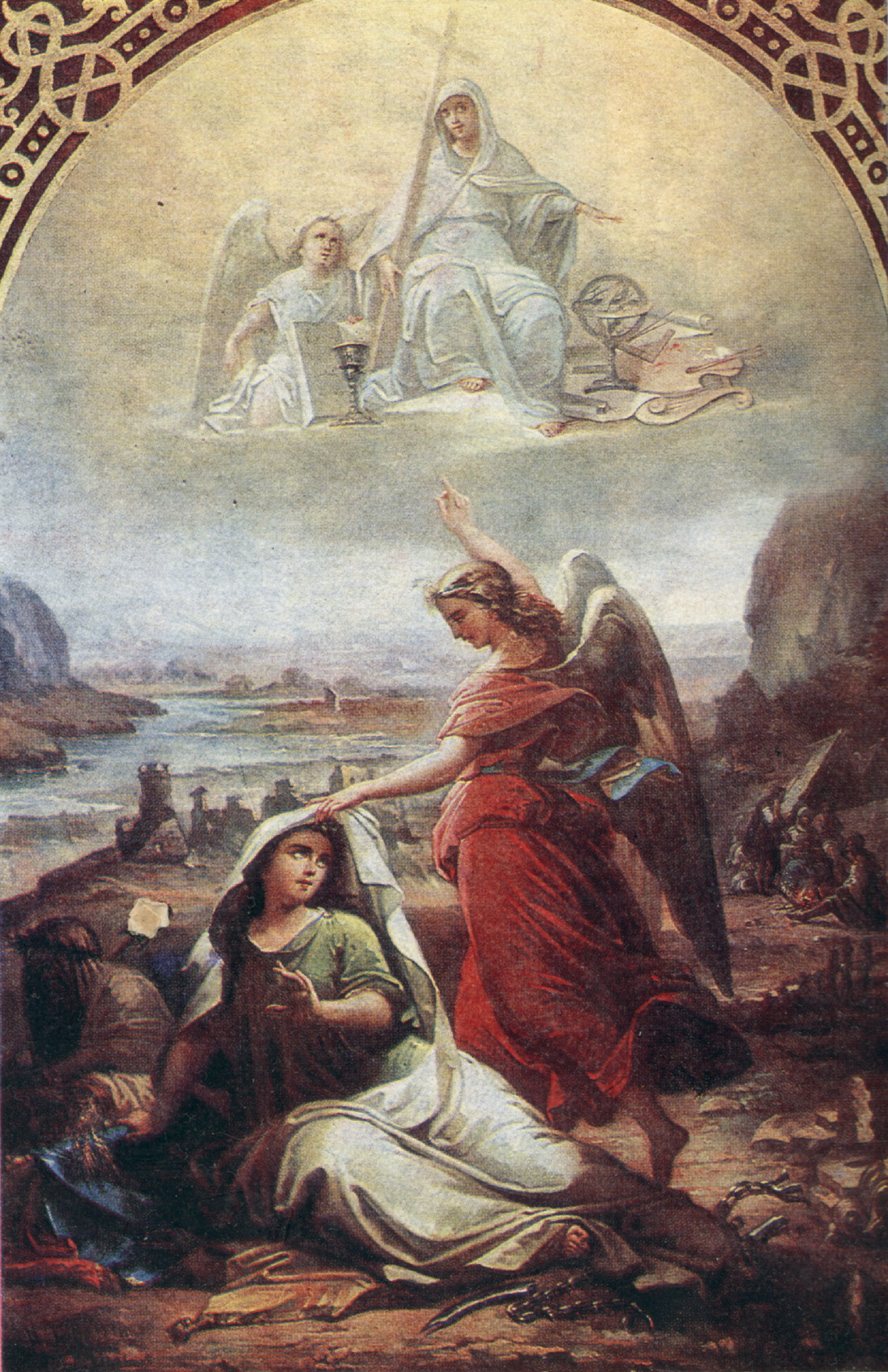 Gheorghe Tattarescu - Deşteptarea României